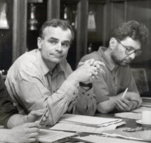 Luzius Theiler, Schweizer Politiker, im Vordergrund, rechts neben ihm Hanspeter Thür